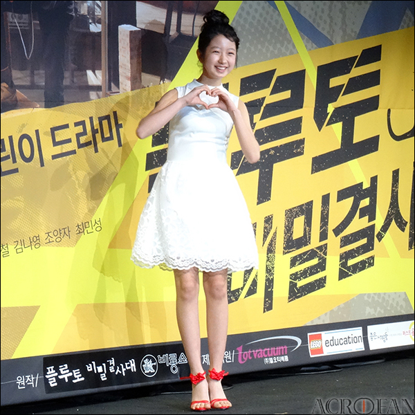 EBS 드라마 '플루토 비밀결사대' 제작발표회